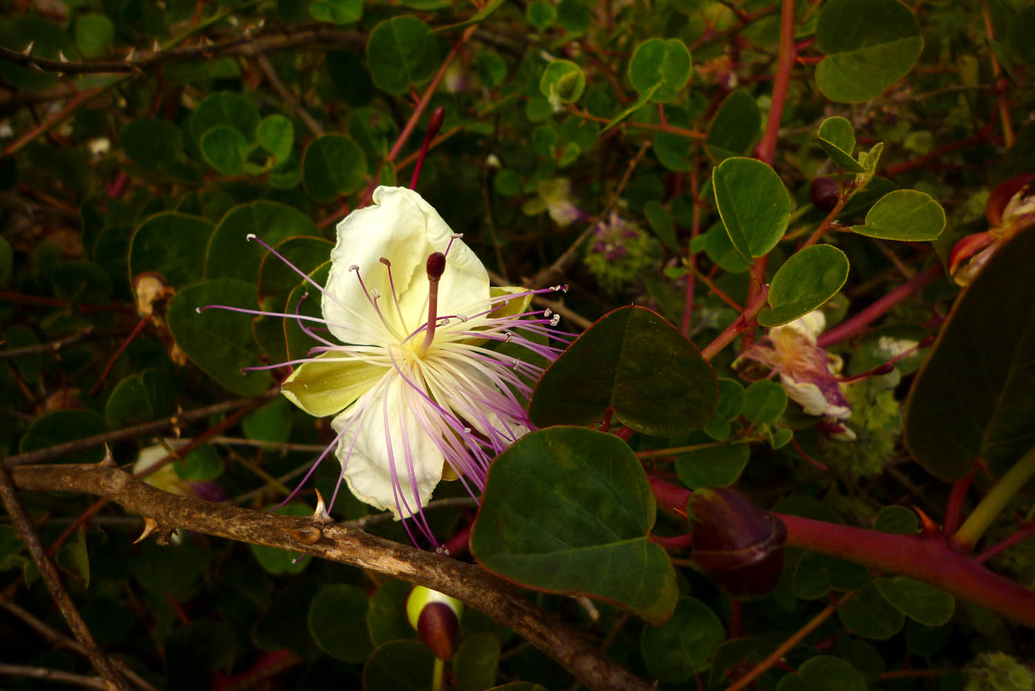 Tapenera de las Sierras Mineras (Capparis zoharyi) en la Sierra Minera de Cartagena (España).